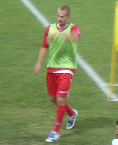 Migjen Basha durante un prepartita del Rimini Calcio.